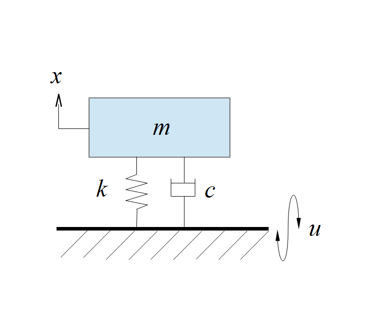 質点、バネ、減衰器の1自由度振動系、基礎が振動変位する場合、サイズモ系の例として